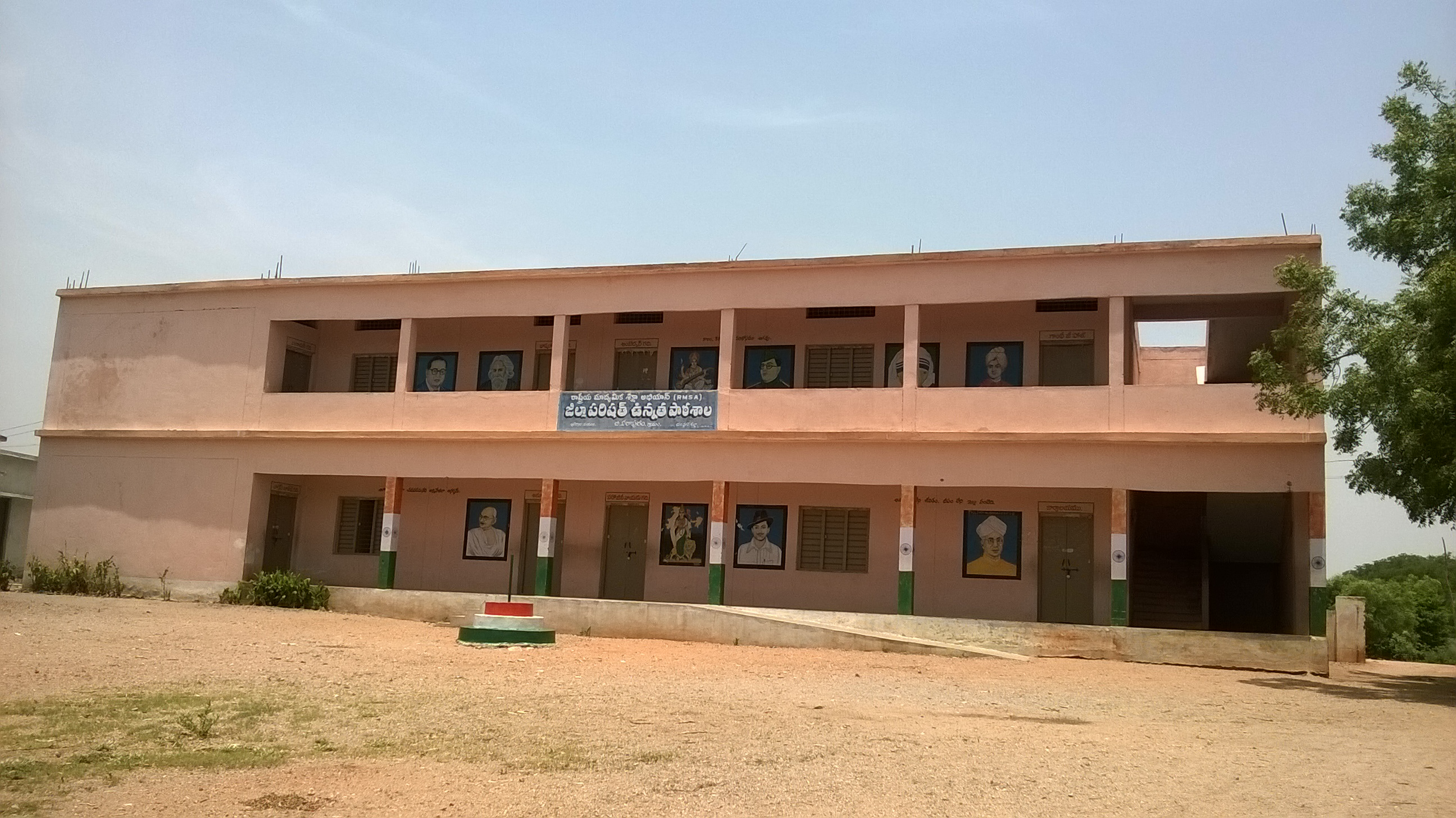 ఉన్నత పాఠశాల, బి.వీరాపురం